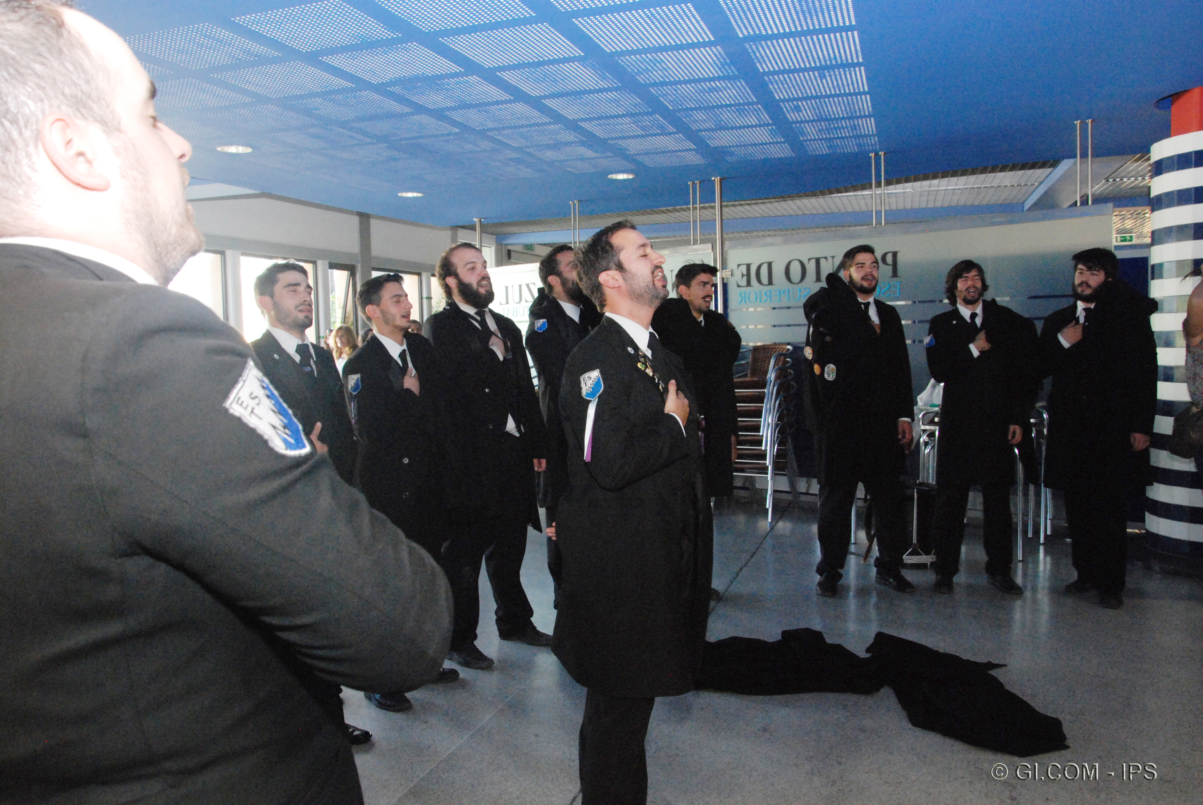 EmpreendLAB Escola Superior de Tecnologia de Setúbal do Instituto Politécnico de Setúbal Instituto Politécnico de Setúbal Foto cedida por: - IPS